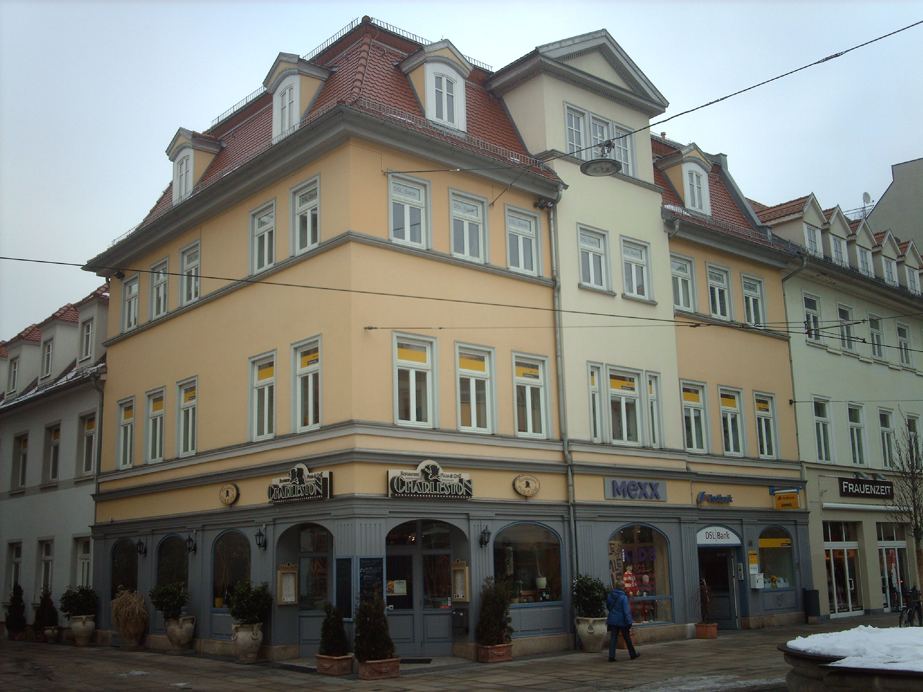 Gebäude Anger 41 in Erfurt, in der DDR Ausstellungsort Galerie im Flur; Zustand 2013Esperanto: Konstruaĵo Anger-strato 41 en Erfurto, kie estis dum la GDR-tempo la Galerio en la koridoro; stato de 2013.